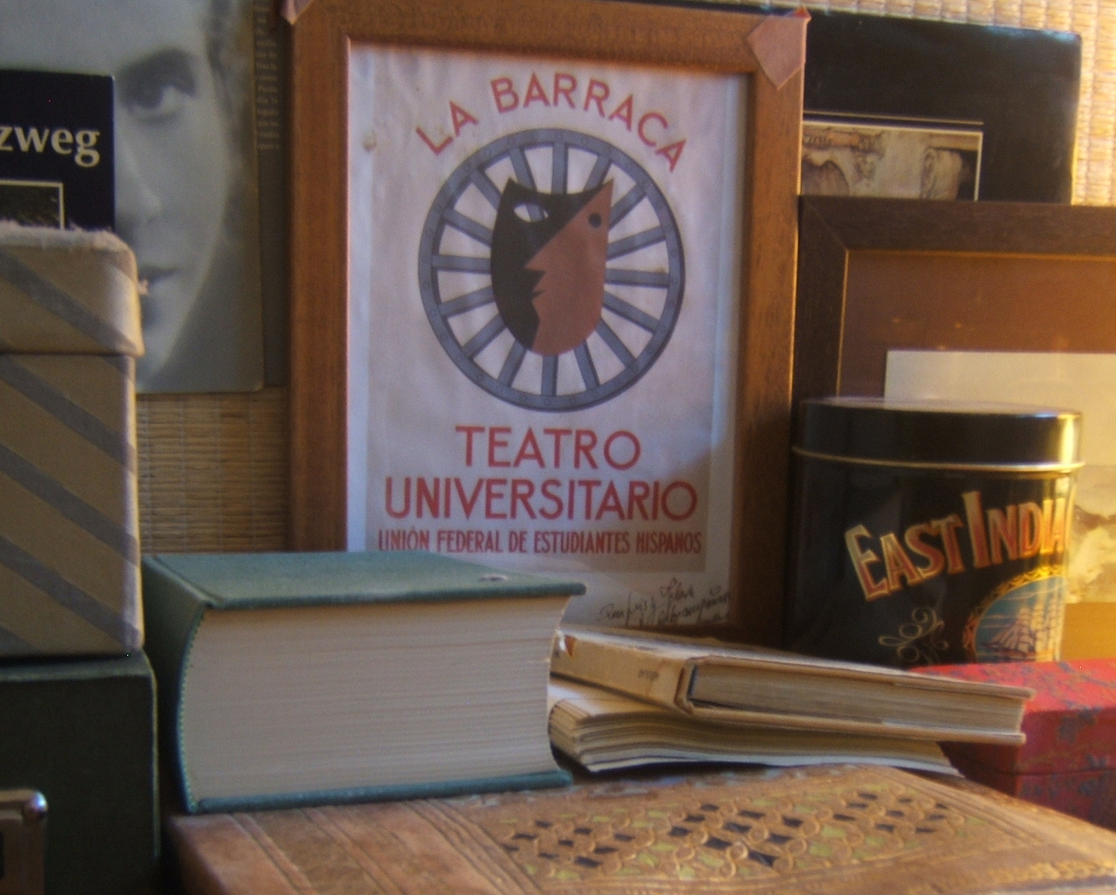 Bodegón.